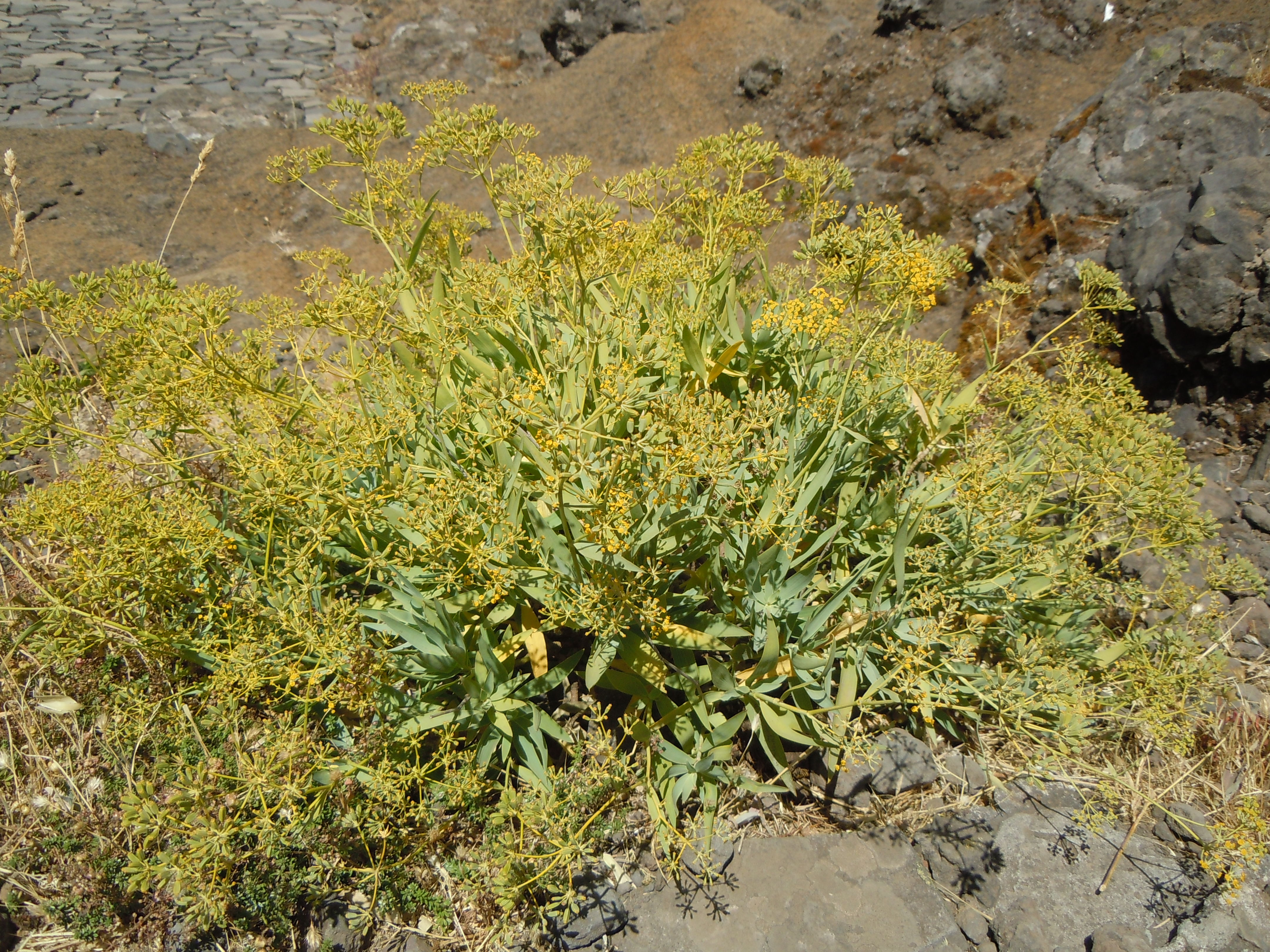 Bupleurum salicifolium, Pico do Arieiro, Madère